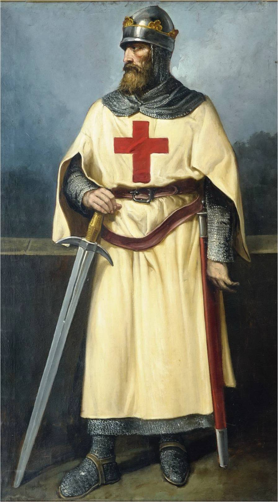 Retrato imaginario del rey Ramiro III de León (961-985). Fue hijo del rey Sancho I de León y de la reina Teresa Ansúrez. Fue sucedido por su primo, Bermudo II de León.